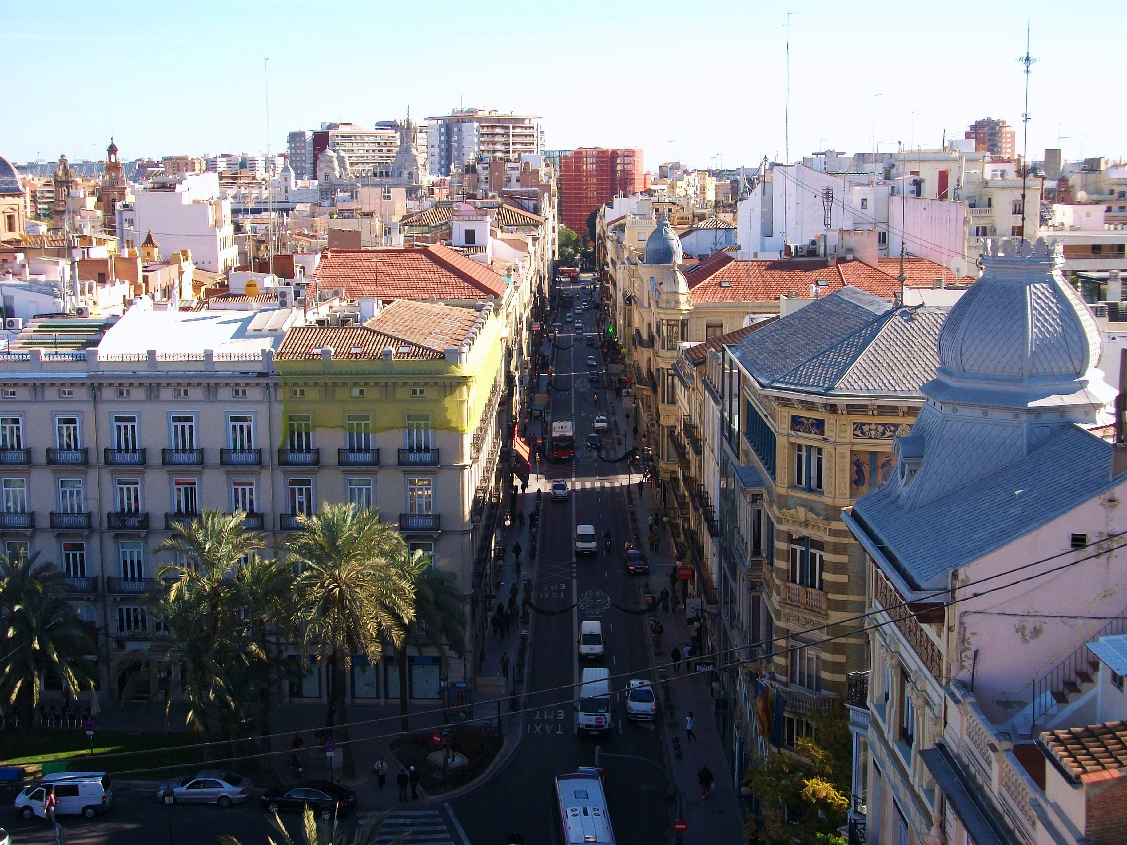 Carrer de la Pau de València vist des del campanar de l'església de santa Caterina.